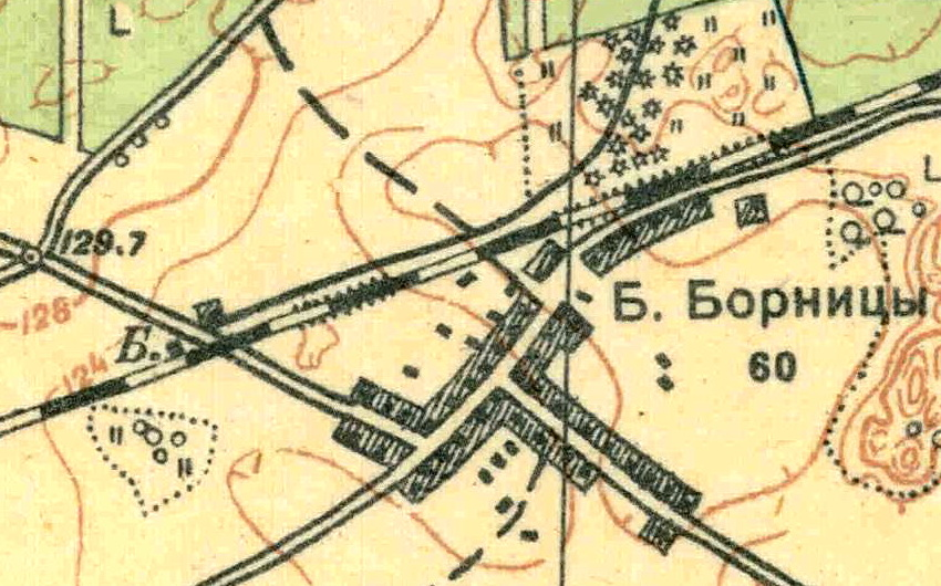 Топографическая карта Ленинградской области, квадрат О-35-24-Б-г (Б. Борницы), деревня Большие Борницы